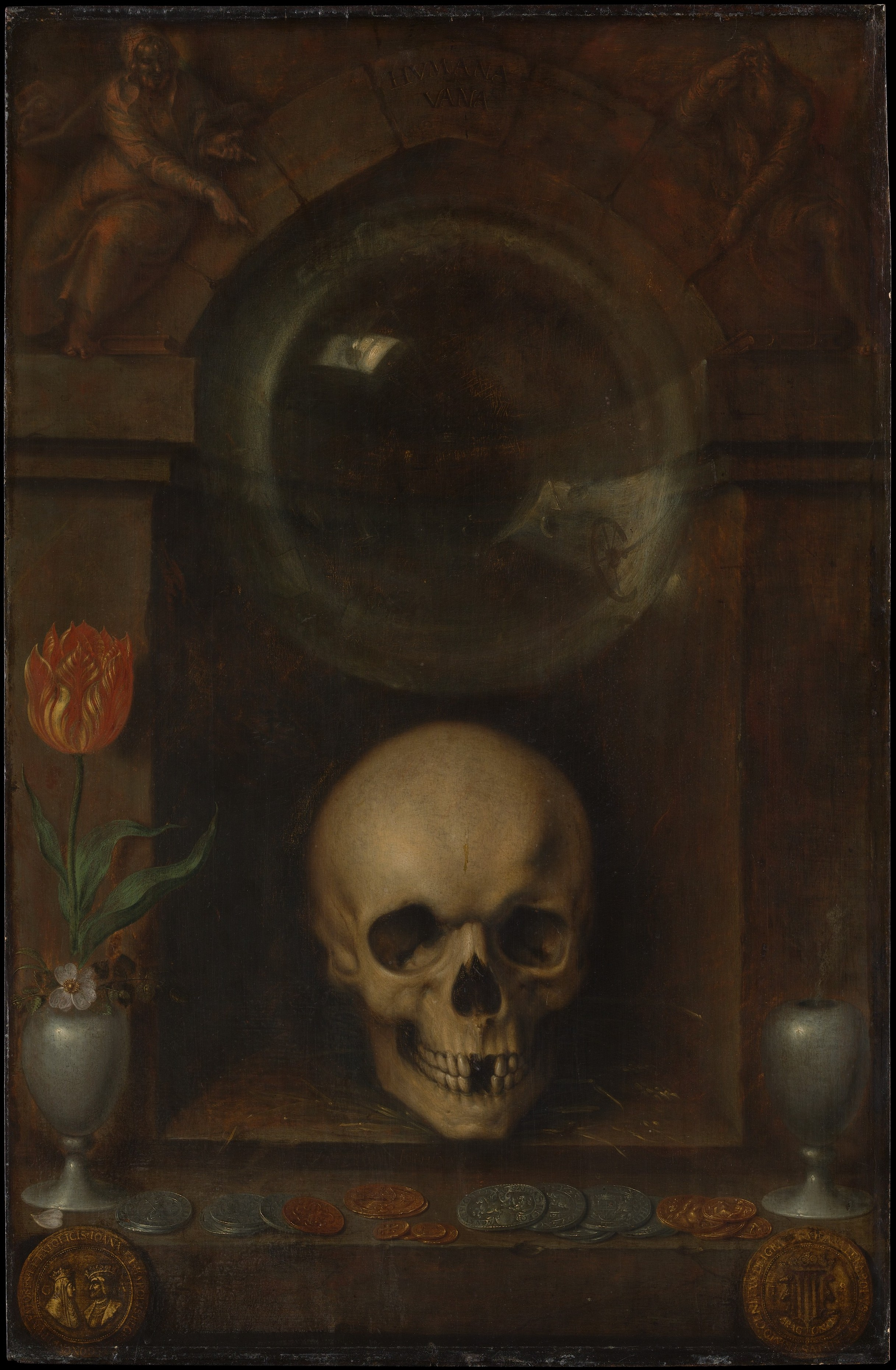 Still Life